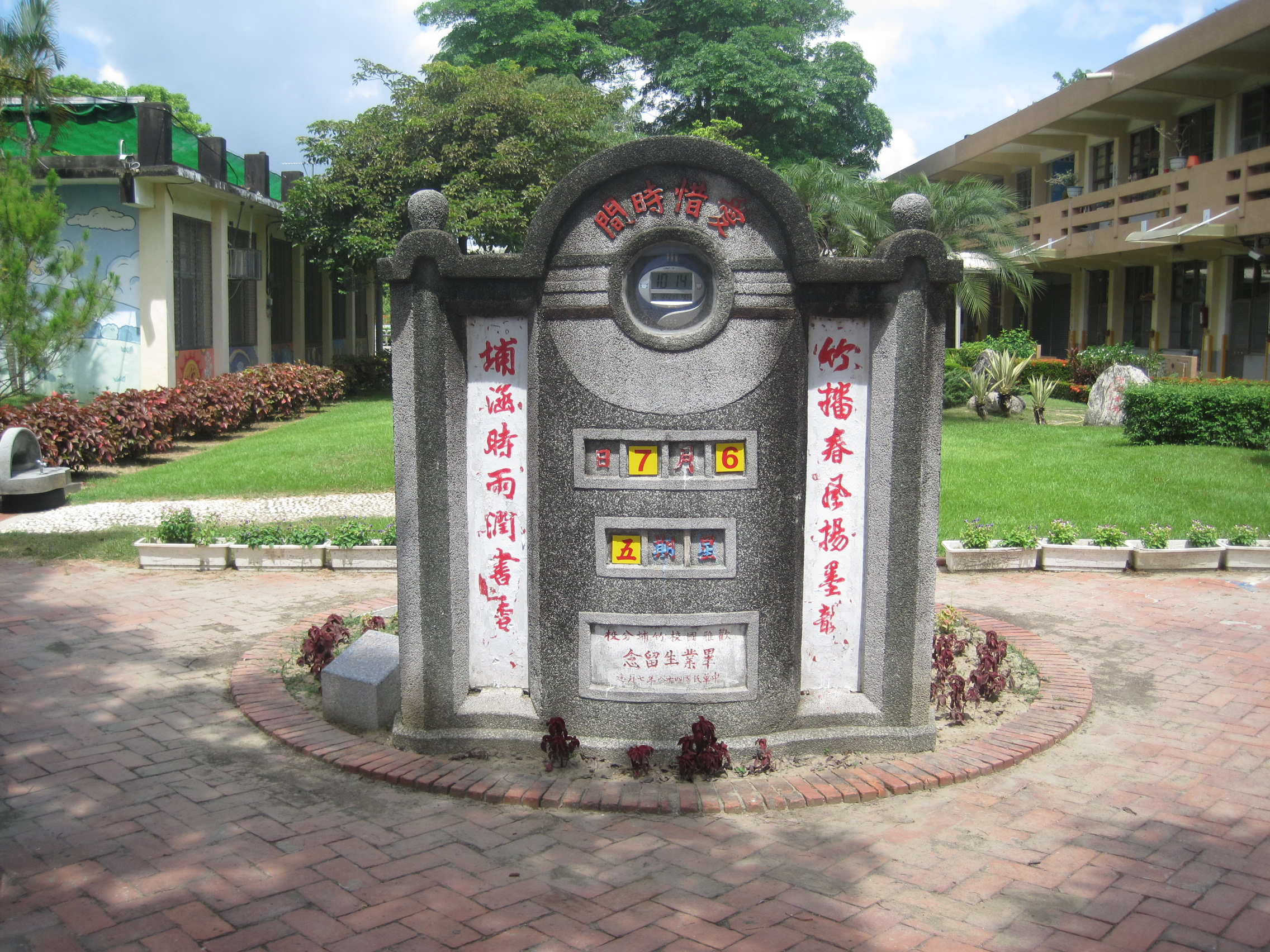 鹽水竹埔國小時鐘座。